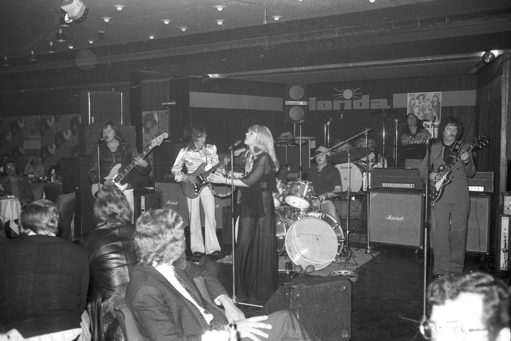 spielt im Tanzcafé Florida. In der Bildmitte die Sängerin Sally Carr.